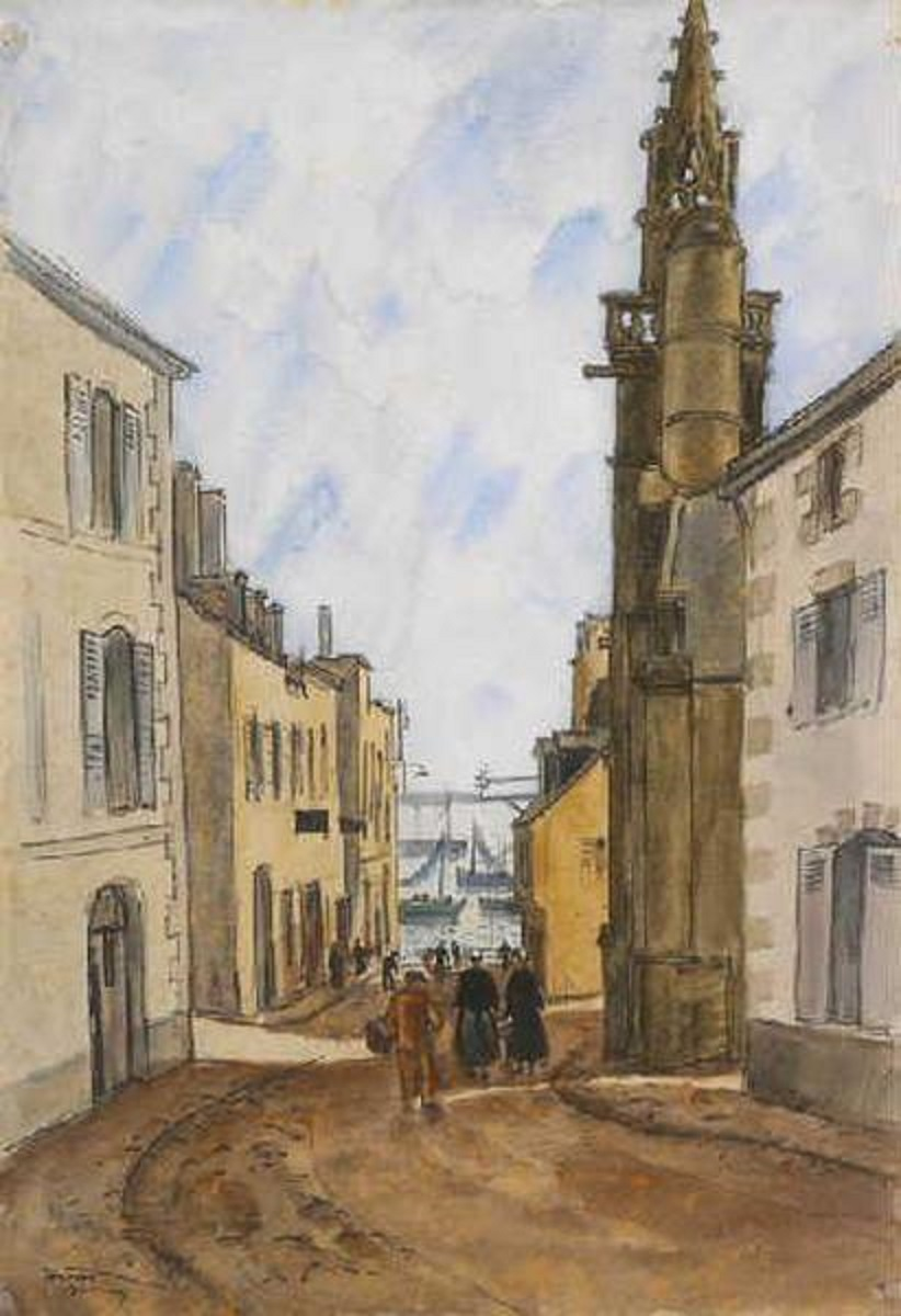 Robert Louis Antral : Rue Monte-au-Ciel à Douarnenez (musée des beaux-arts et d'archéologie de Châlons-en-Champagne)